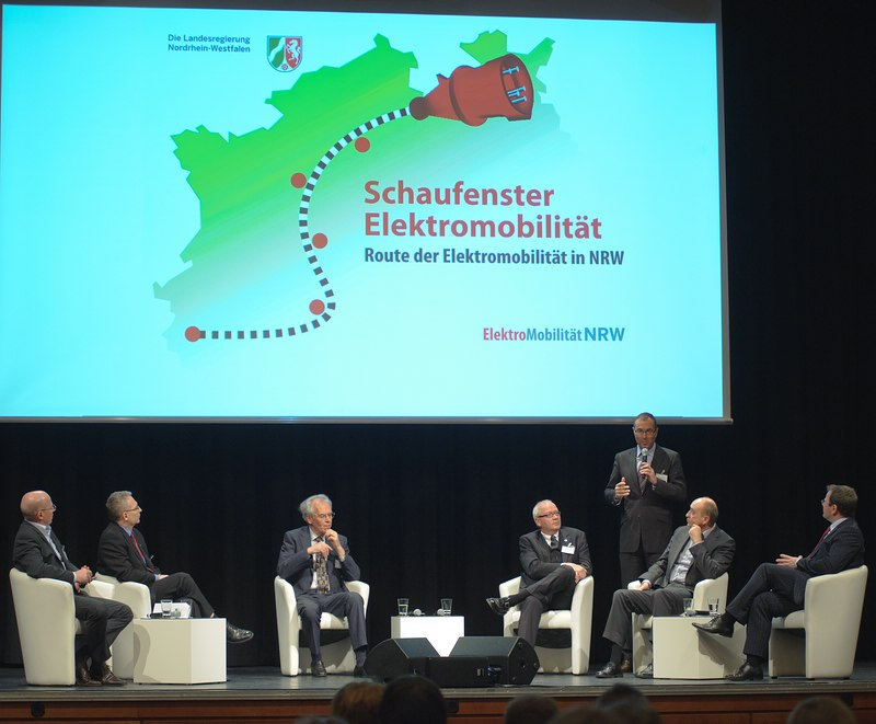 NRW-Bewerbung „Schaufensterregion für Elektromobilität“ 15.12.2011 Schaufenster Elektromobilität Flickr tags: Schaufenster Elektromobilität; Düsseldorf; Maritim Hotel; EnergieAgentur.NRW; Bewerbung; Klimaschutz; EANRW; NRW; Elektromobilität; Route der Elektromobilität; Energiewende; Klimawandel; Johannes Remmel; Svenja Schulze